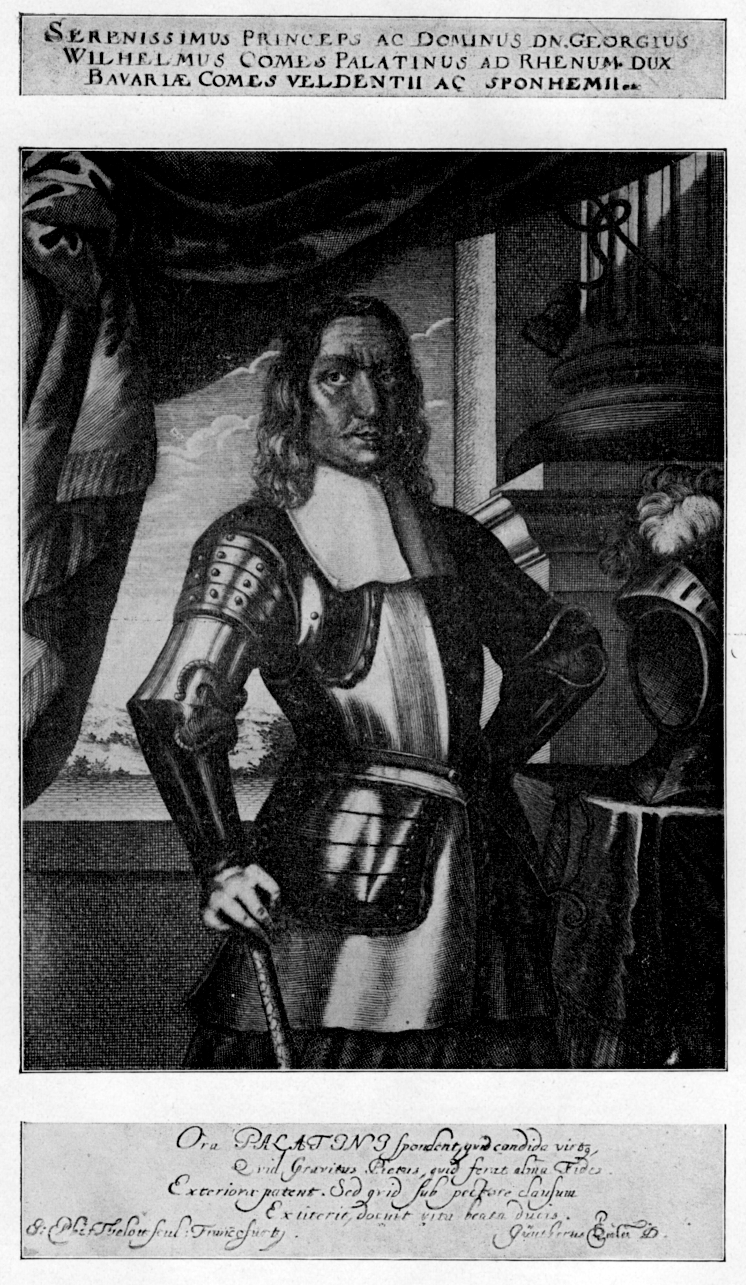 Pfalzgraf Georg Wilhelm von Pfalz-Birkenfeld, 1591-1669